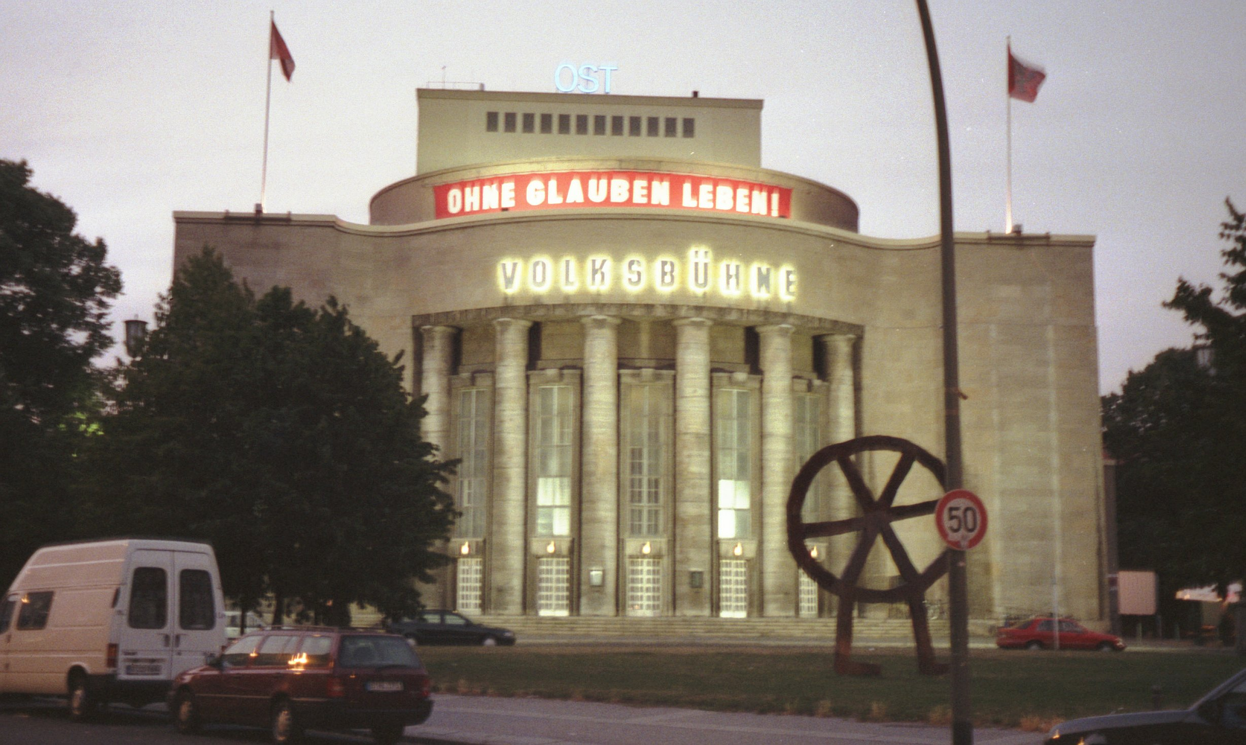 Volksbühne Theatre, Rosa Luxemburg Platz, Mitte, Berlin.